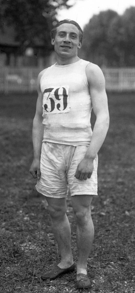 26-5-12, Colombes, Mourlon [vainqueur du 100 mètres] : [photographie de presse]